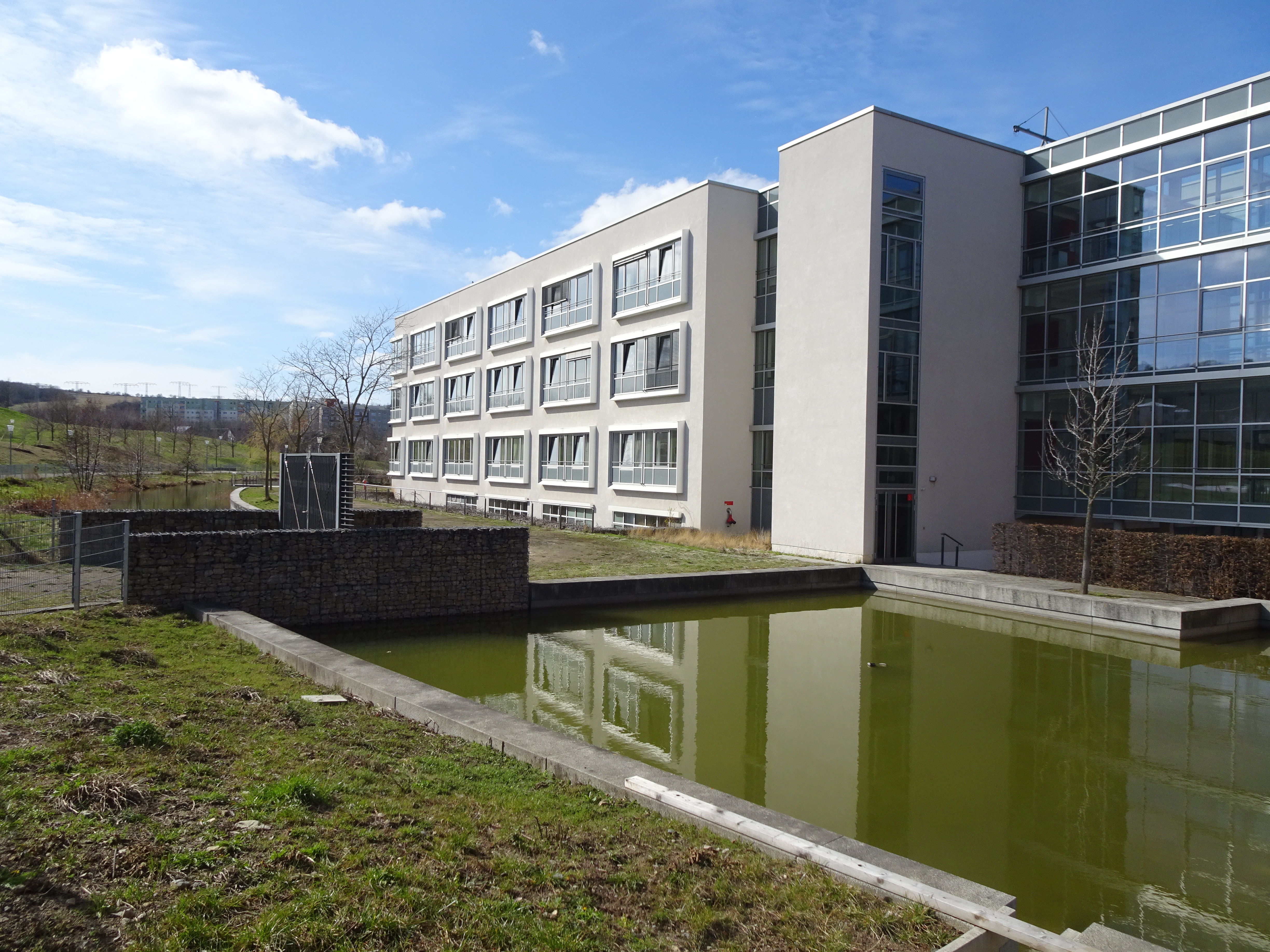 Katholisches Krankenhaus in Erfurt